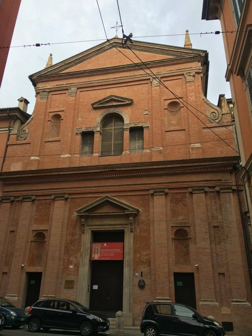 La chiesa di San Giorgio in Poggiale a Bologna.